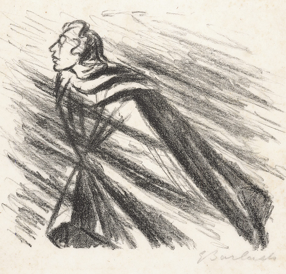 Aus dem Mappenwerk "Goethe/Ausgewählte Gedichte"